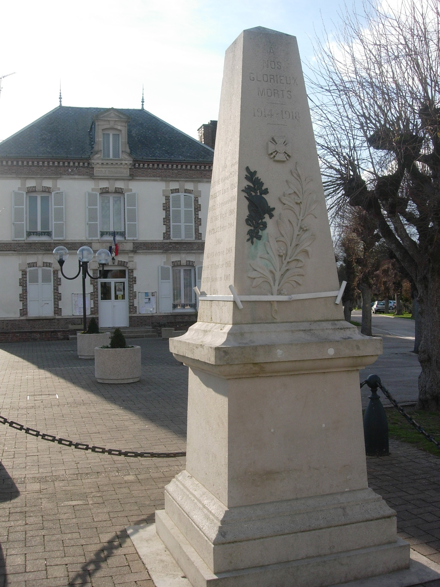 Monument aux morts et mairie d'Ossey-les-Trois-Maisons (Aube)